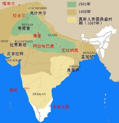 莫卧儿帝国（法文维基，向柏霖加工）